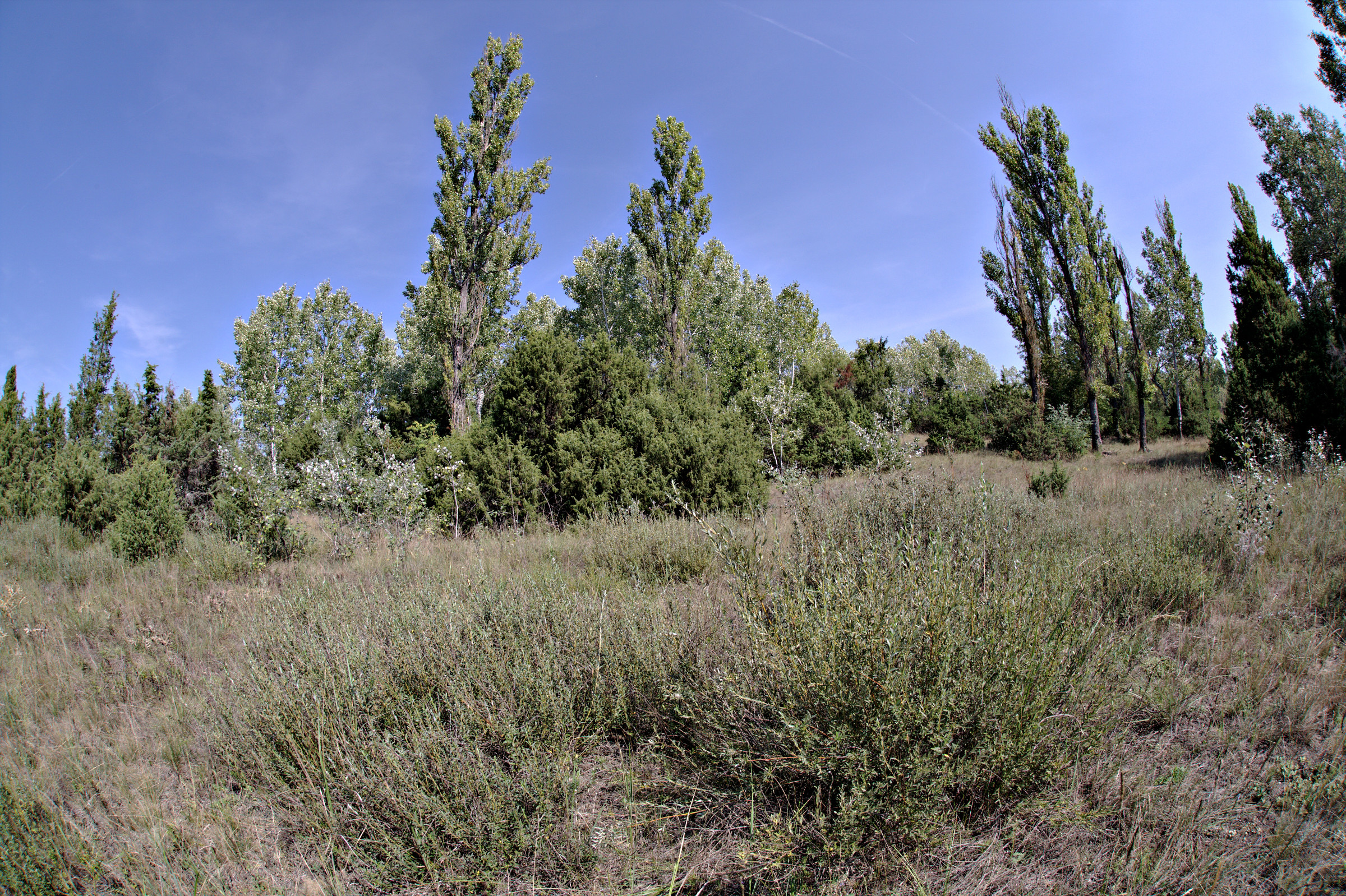 Csévharaszti Borókás Természetvédelmi Terület